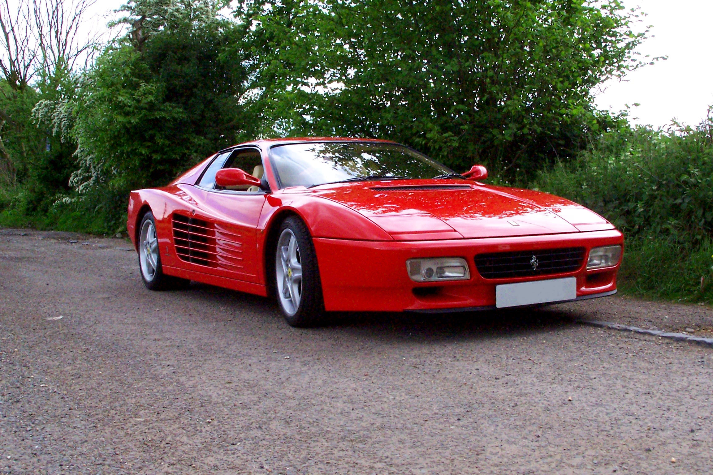 Ferrari 512TR